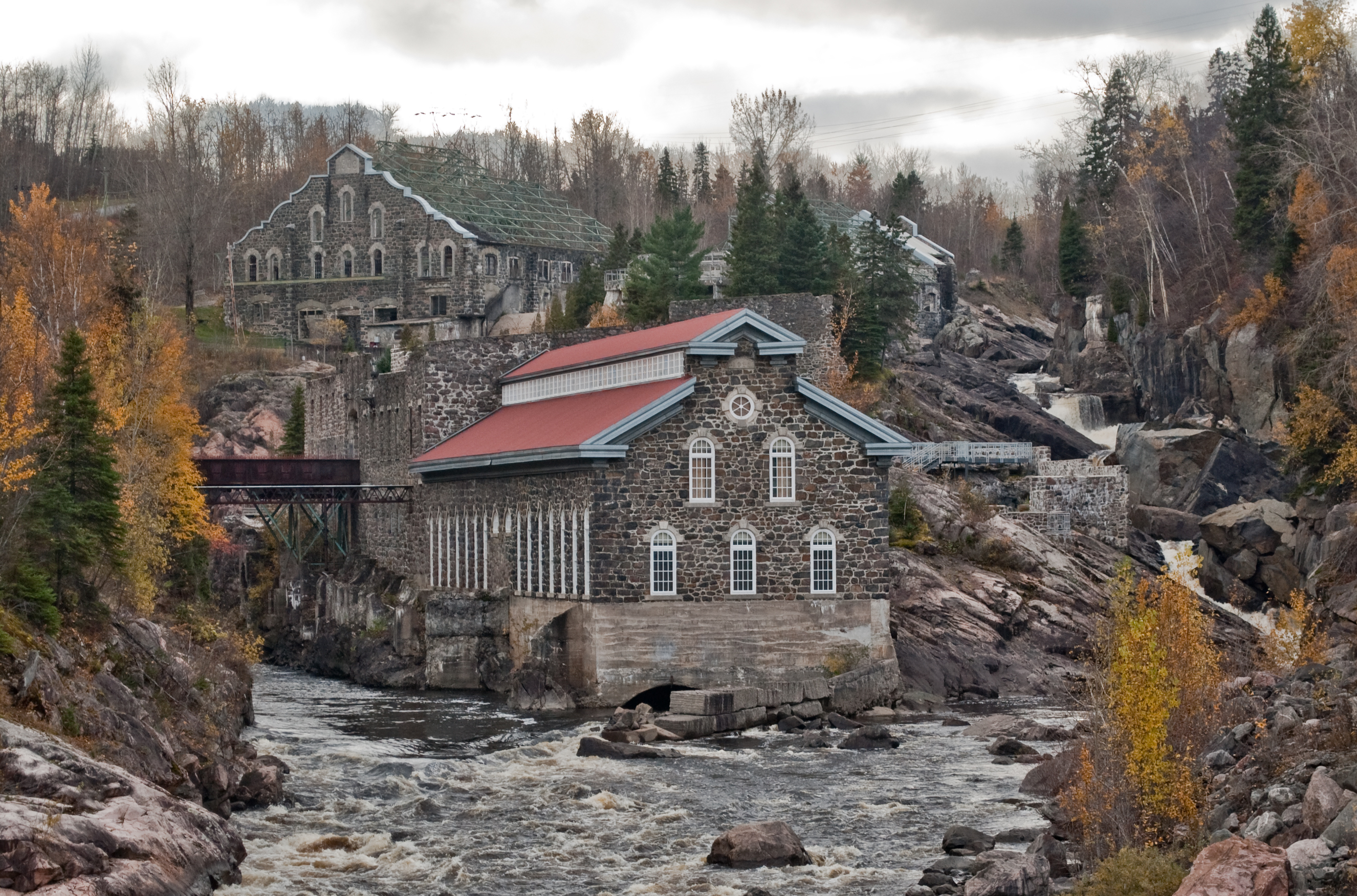 Pulperie de Chicoutimi sur la rivière Chicoutimi, Moulin 1912 en avant plan, 1903 en arrière-plan